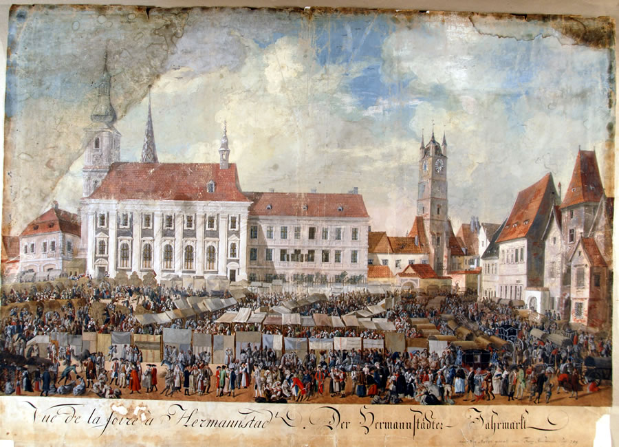 Romanian: Târg anual la Sibiu, 1789